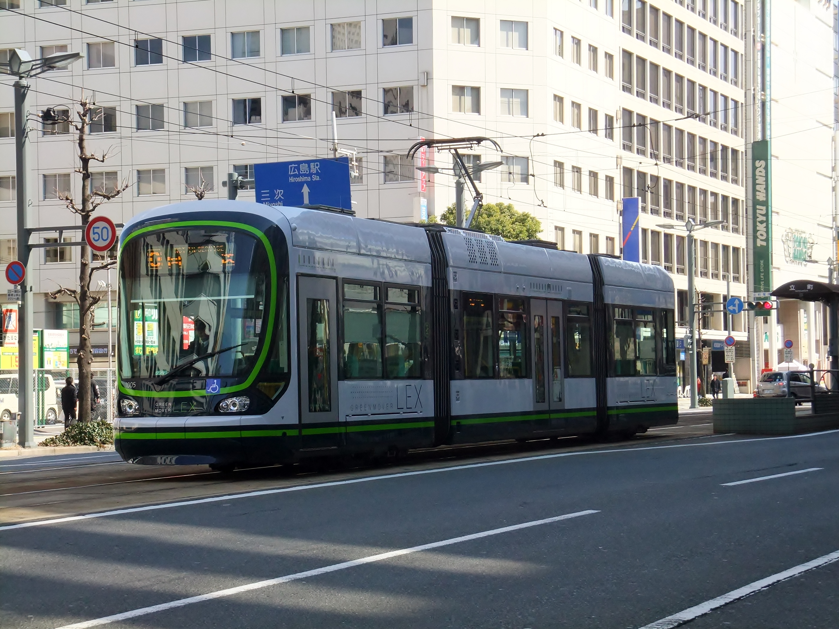 広電1000形電車（2代目）